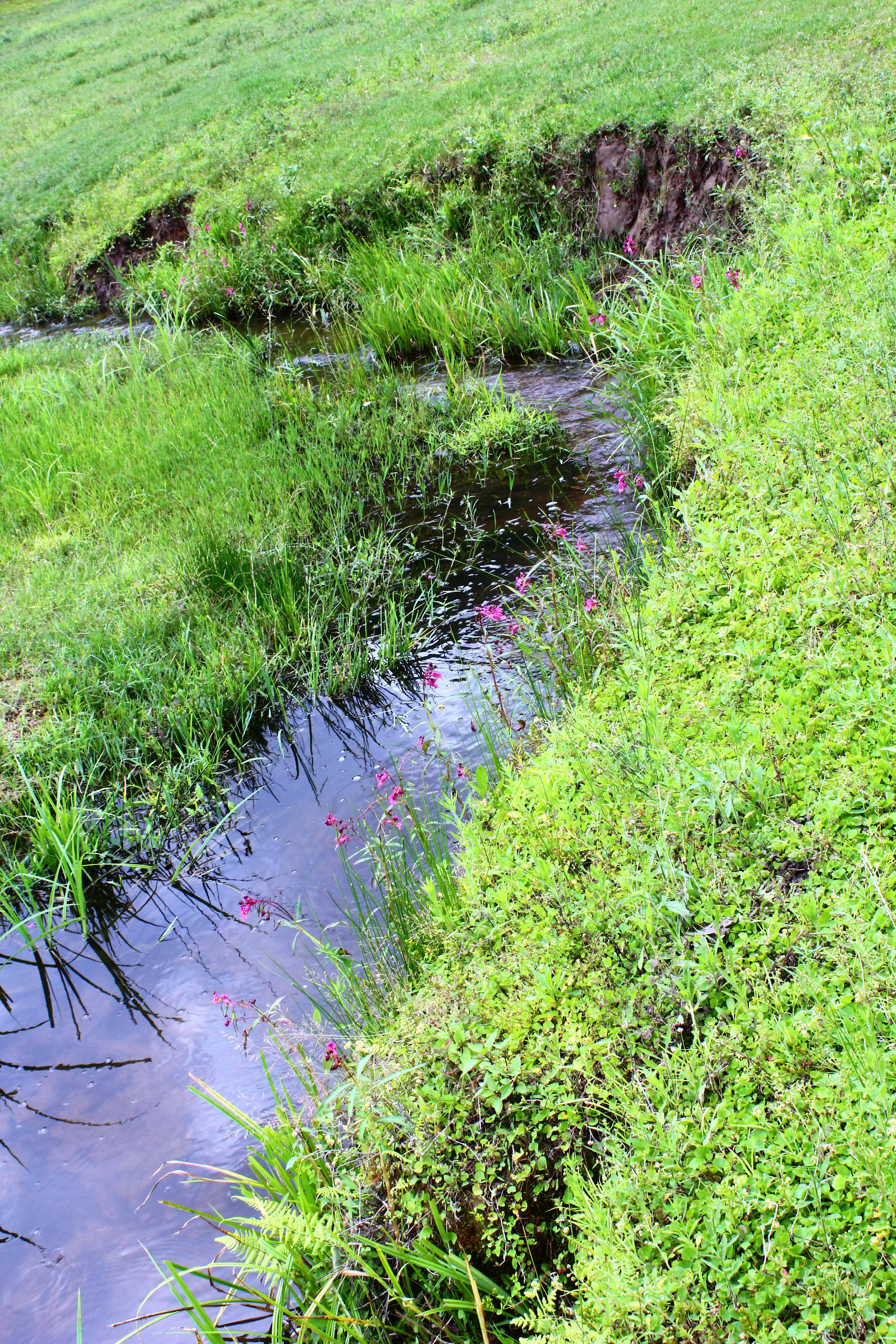 云南省安宁市县街河，拍摄于小箐口水库